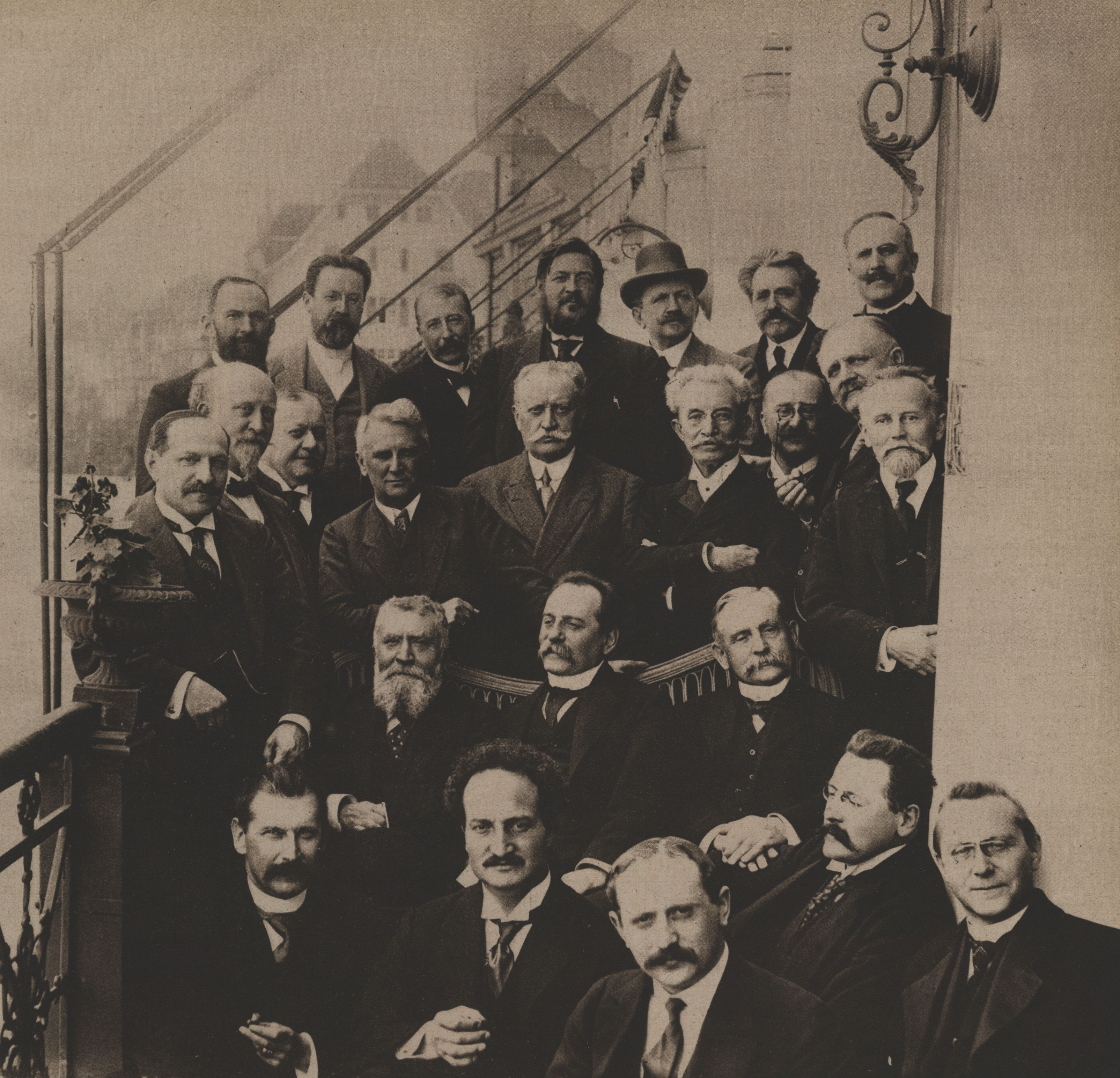 "Un groupe de congressistes français et allemands réunis à l'hôtel des Trois Rois, à Bâle".